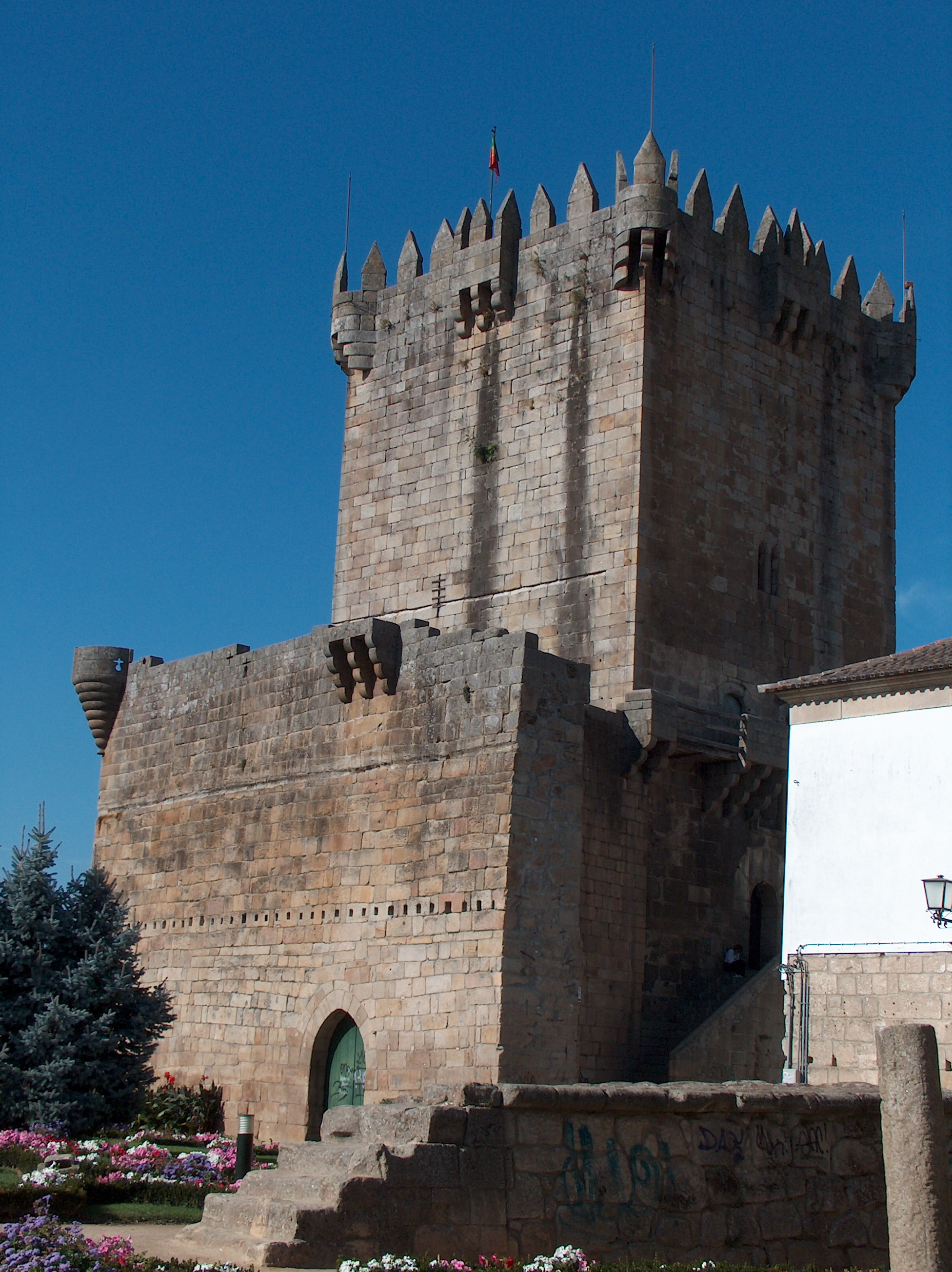 Descrição Castelo de ChavesTorre de menagem do Castelo de Chaves, concelho de Chaves, Distrito de Vila Real Fonte Carregada pelo autor Autor João Carvalho